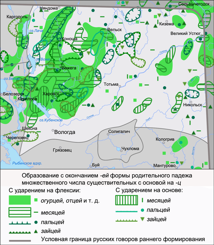 Карта распространения форм родительного падежа множественного числа существительных с основой на -ц с окончанием -ей на территории Вологодской группы говоров. Источник: Захарова К. Ф., Орлова В. Г., Сологуб А. И., Строганова Т. Ю. Образование севернорусского наречия и среднерусских говоров / ответственный редактор В. Г. Орлова. — М.: Наука, 1970. — С. 275 (карта 82).